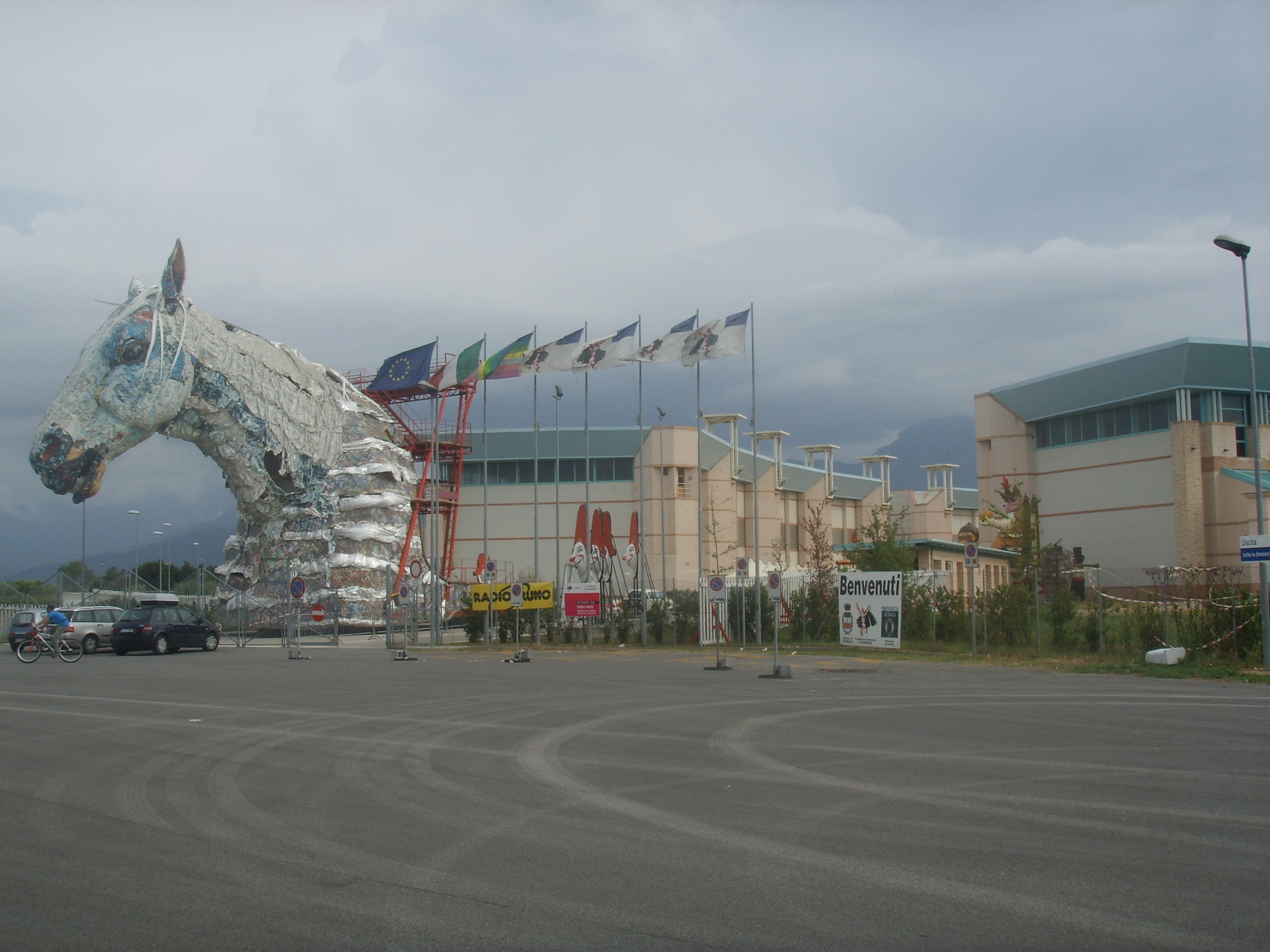 Cittadella del Carnevale in Viareggio, Italy